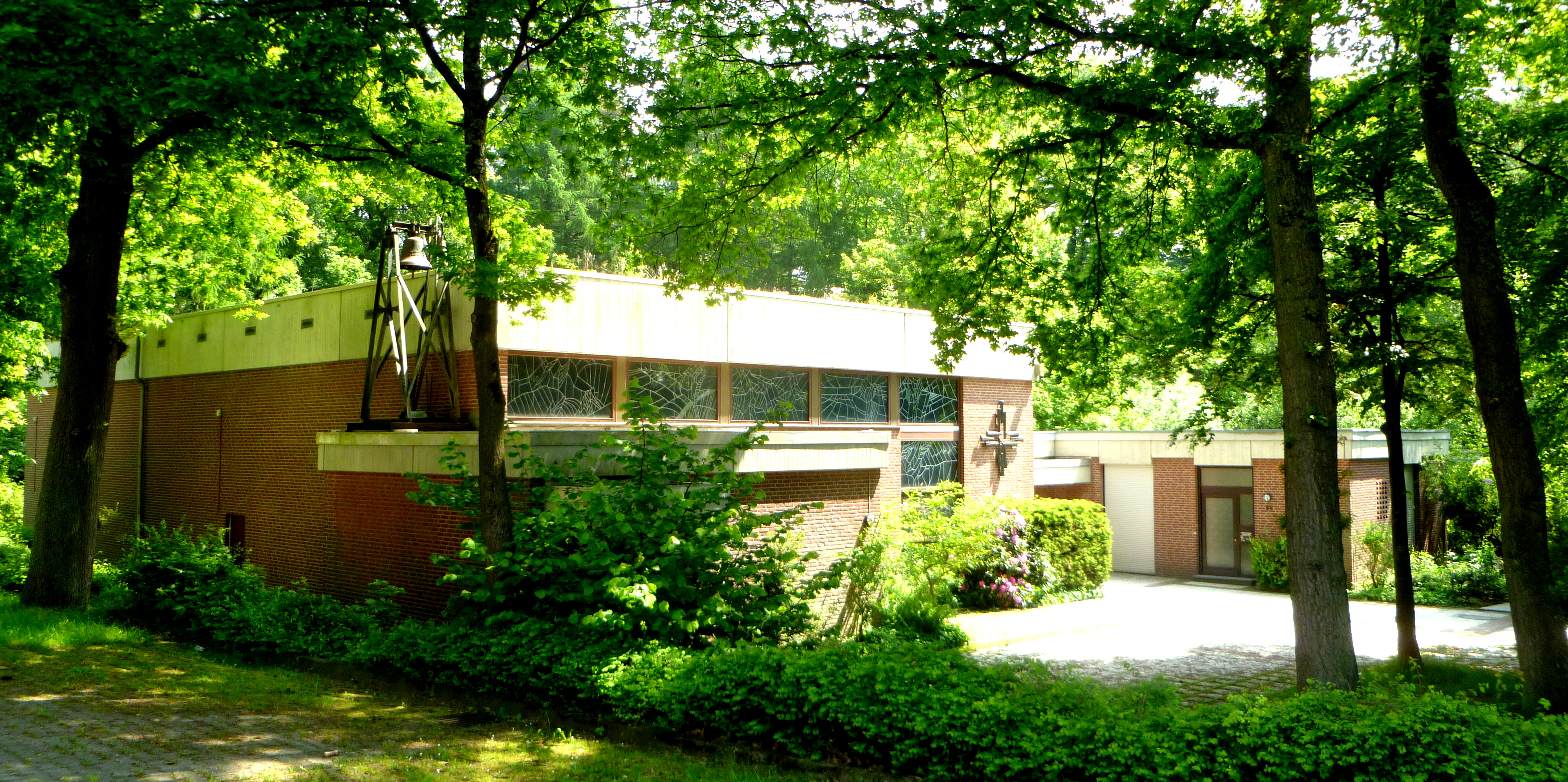 Gemeindezentrum der Pfarrei Maria im Tann, Siedlung Preuswald, Aachen